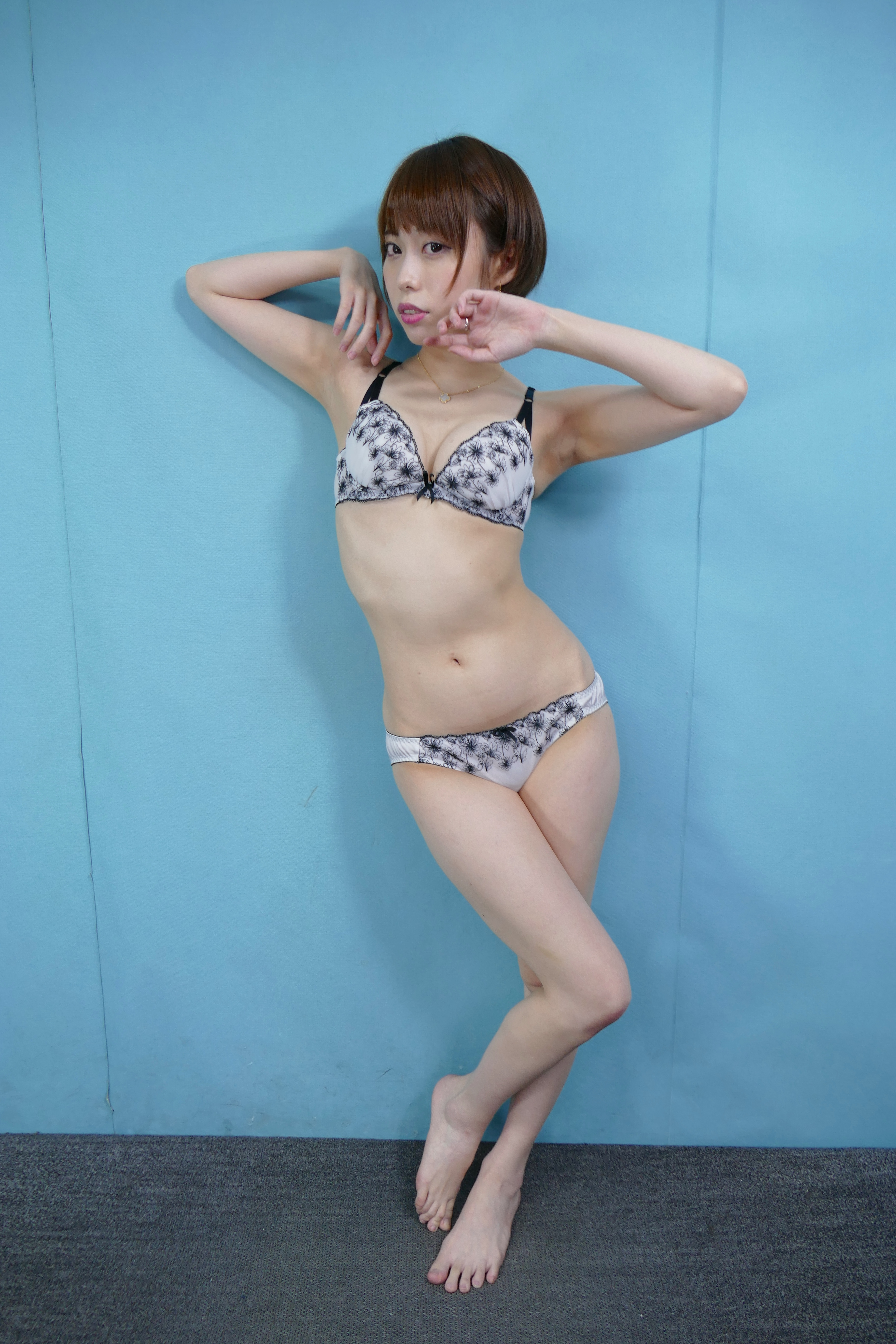 秋葉原にて2019年06月02日